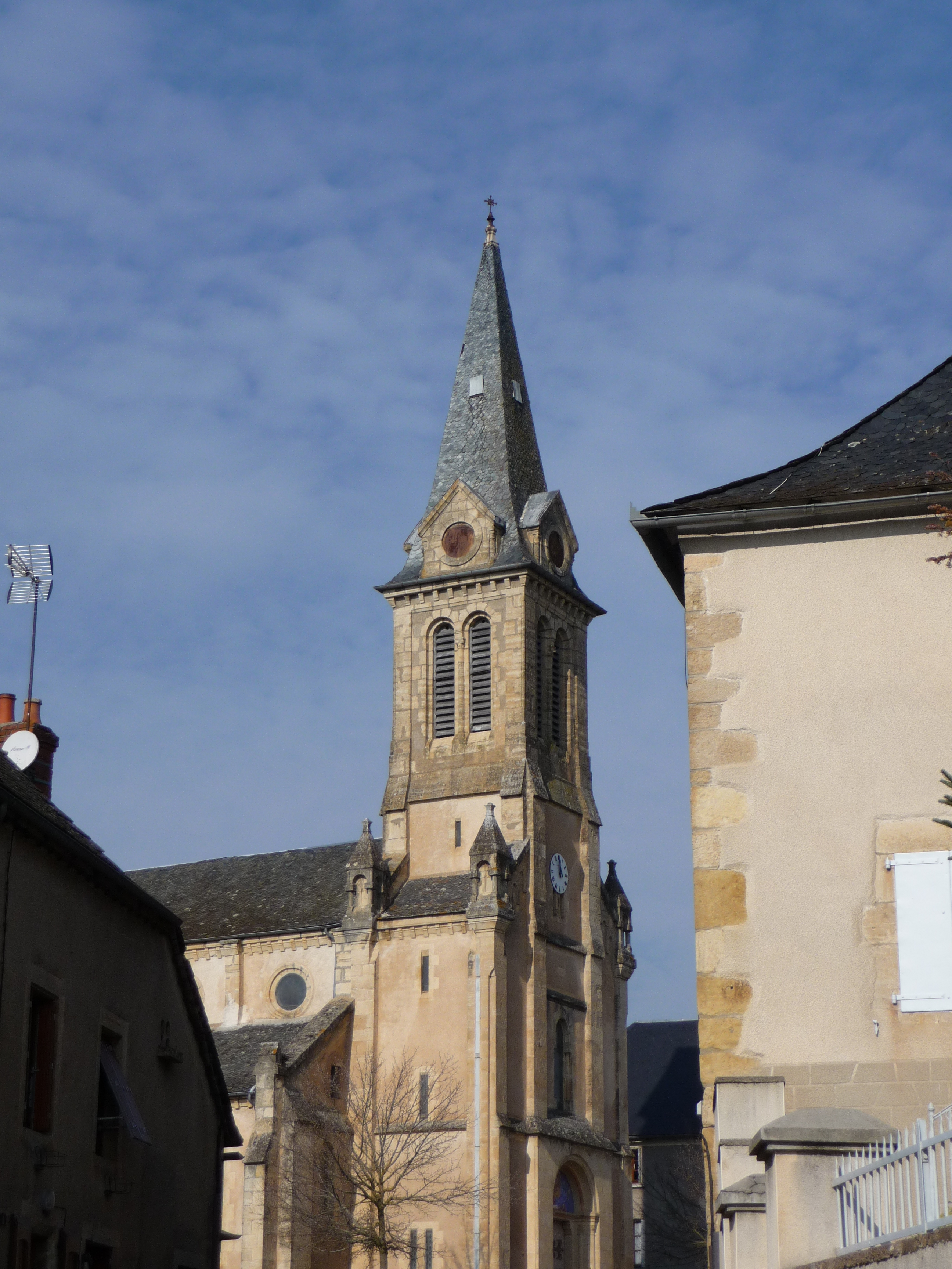 Campanar de l'església de Gabriac